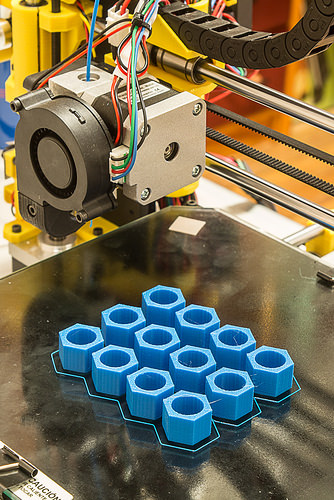 3D inprimagilua lanean